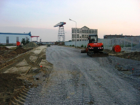 Koningsweg Vlissingen 2005, in 2015 omgedoopt in De Willem Ruysstraat